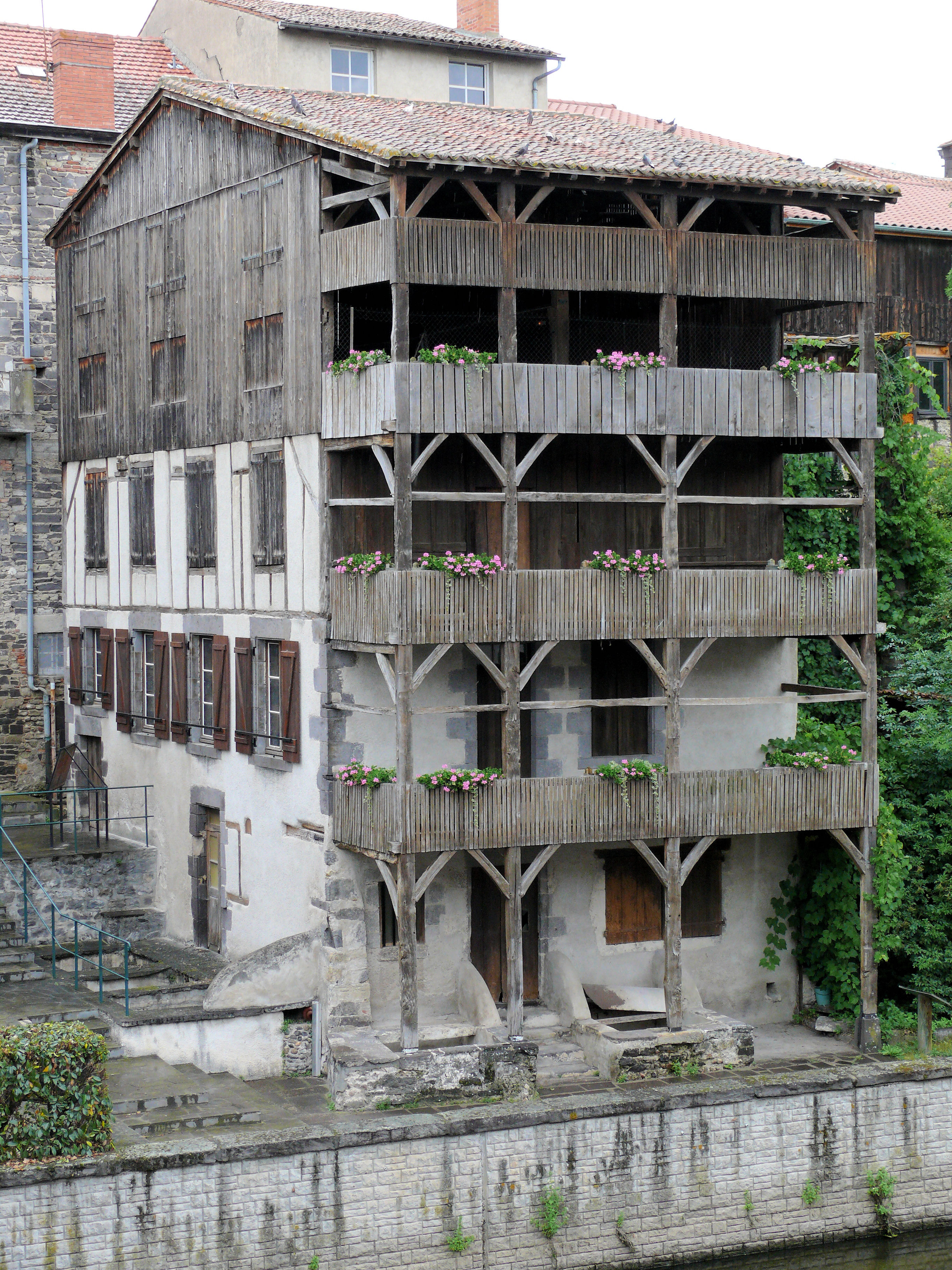 Maringues - Ancienne tannerie